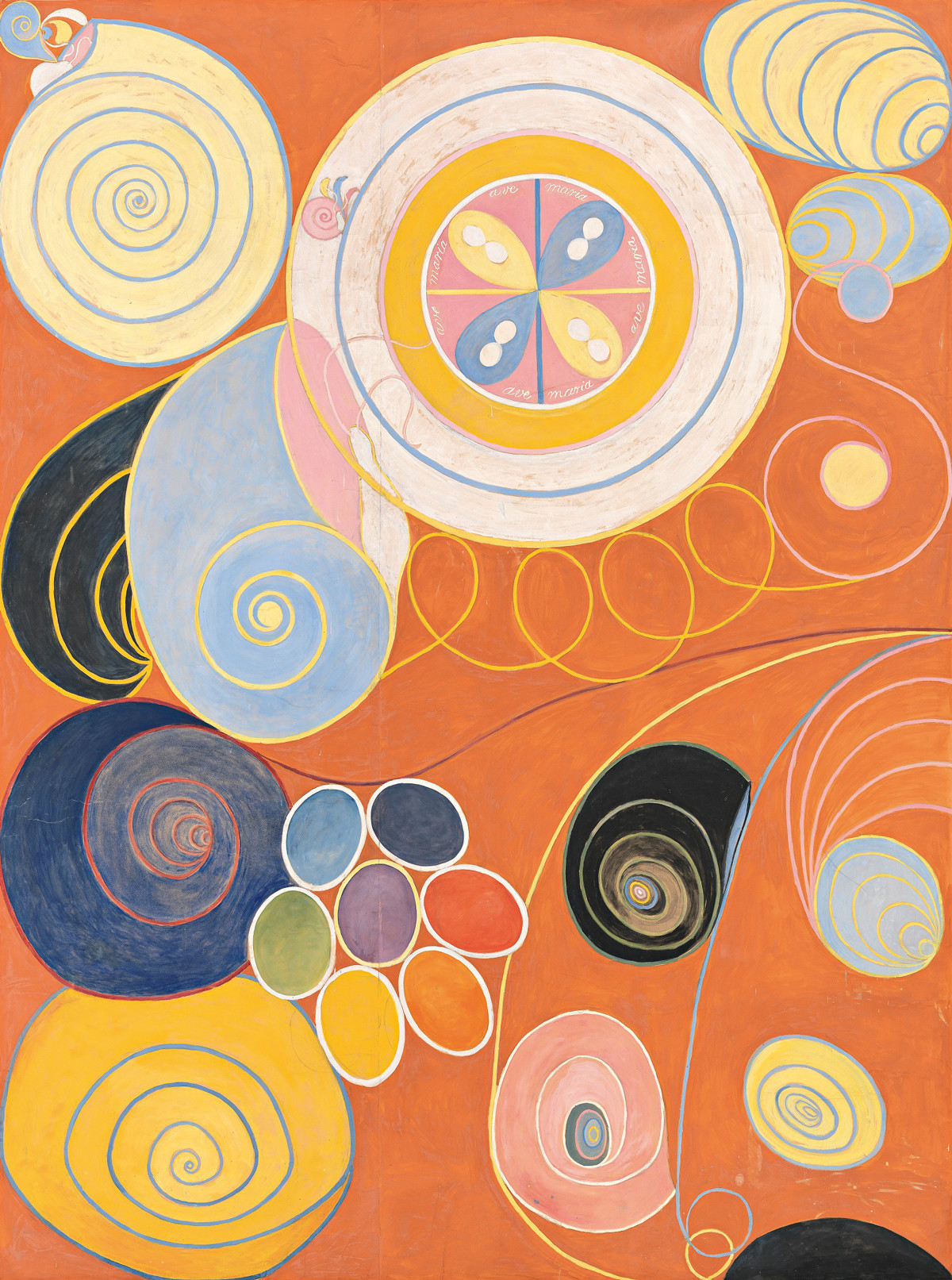 Hilma af Klint, De tio största, nr 3. Ynglingaåldern. Ur Grupp 4, 1907 Courtesy Stiftelsen Hilma af Klints Verk. Photo: Albin Dahlström/ Moderna Museet.